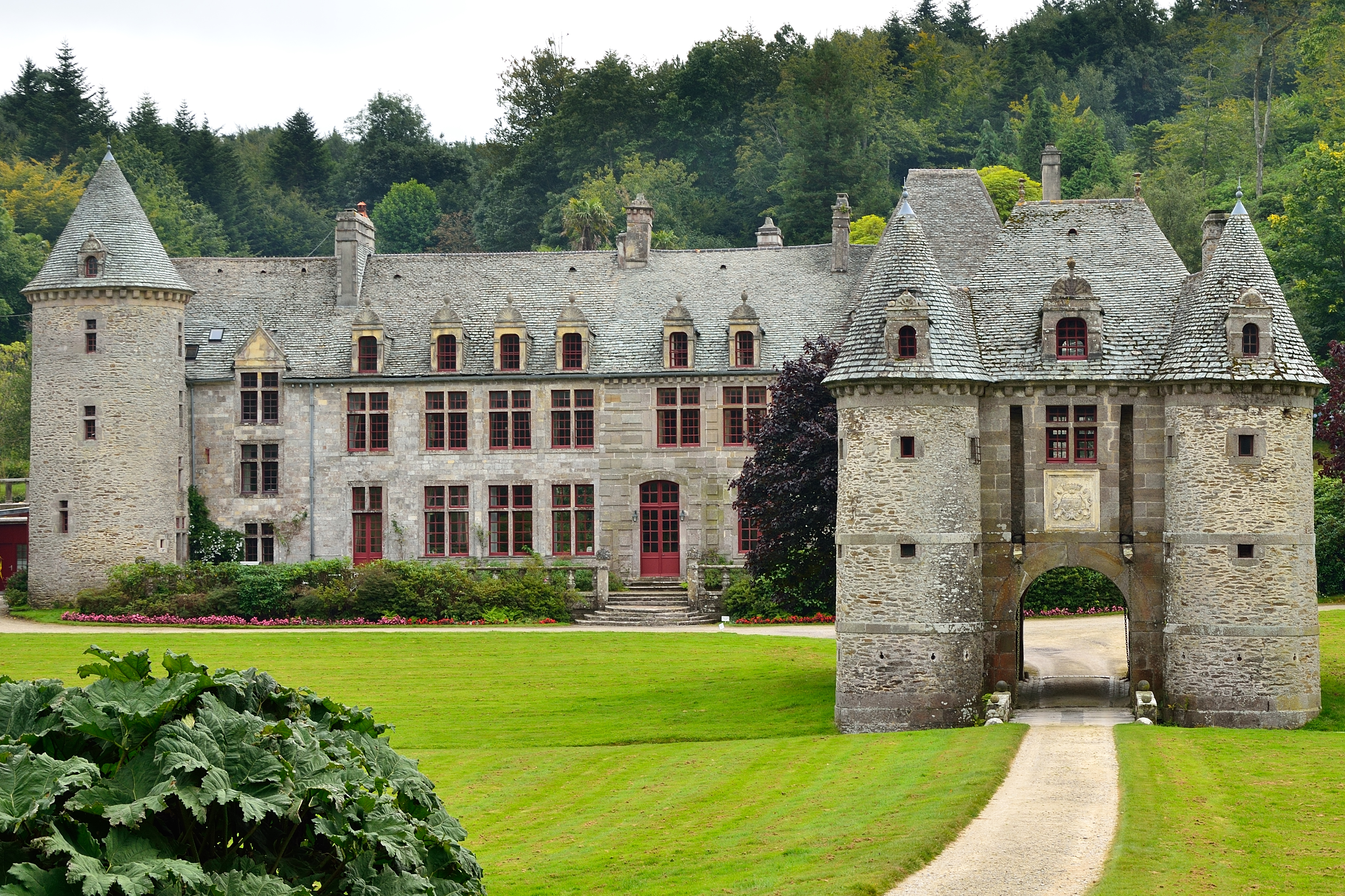 Chateau de Nacqueville, Urville-Nacqueville, Manche, Normandie, France .